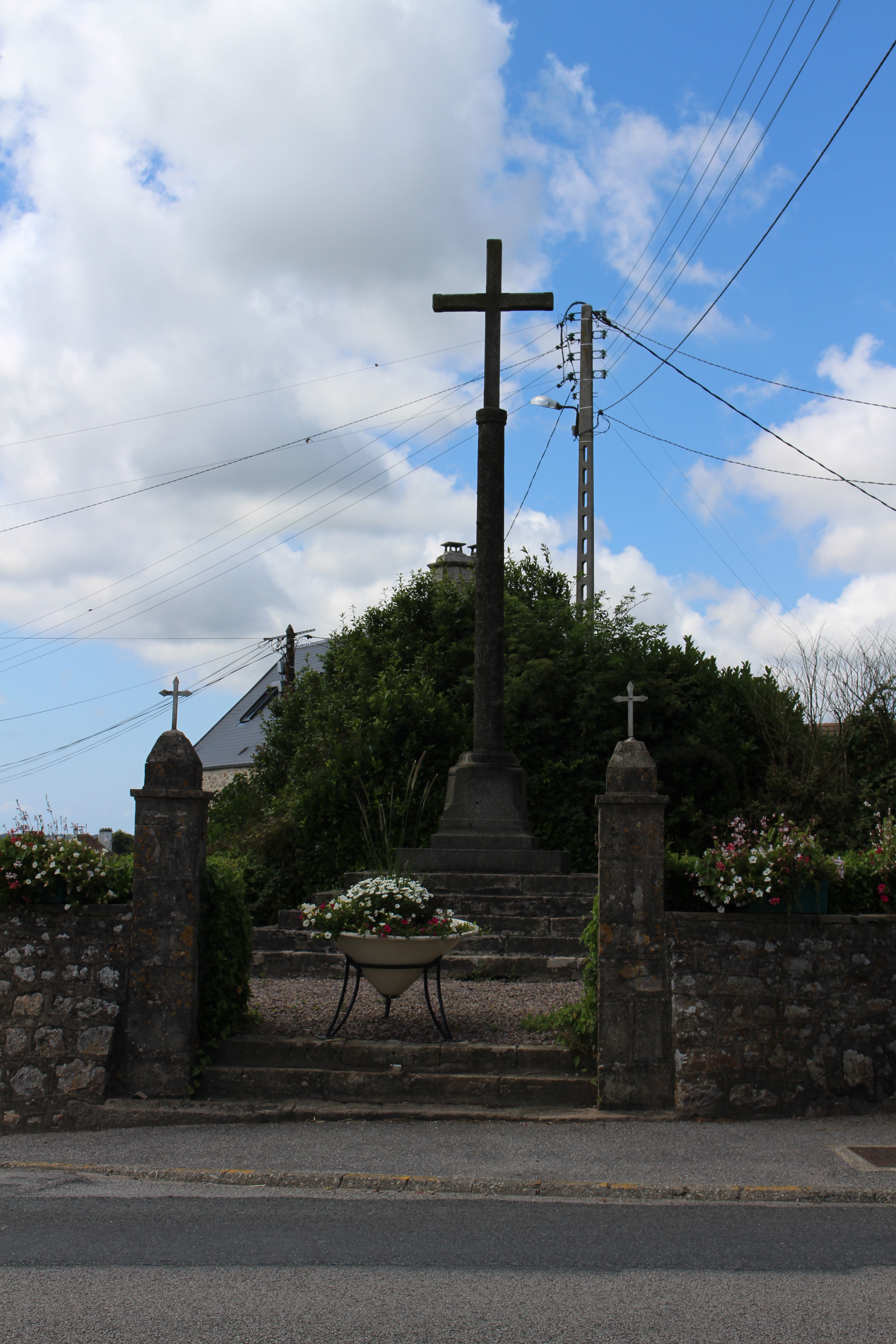 Quettetot, Manche